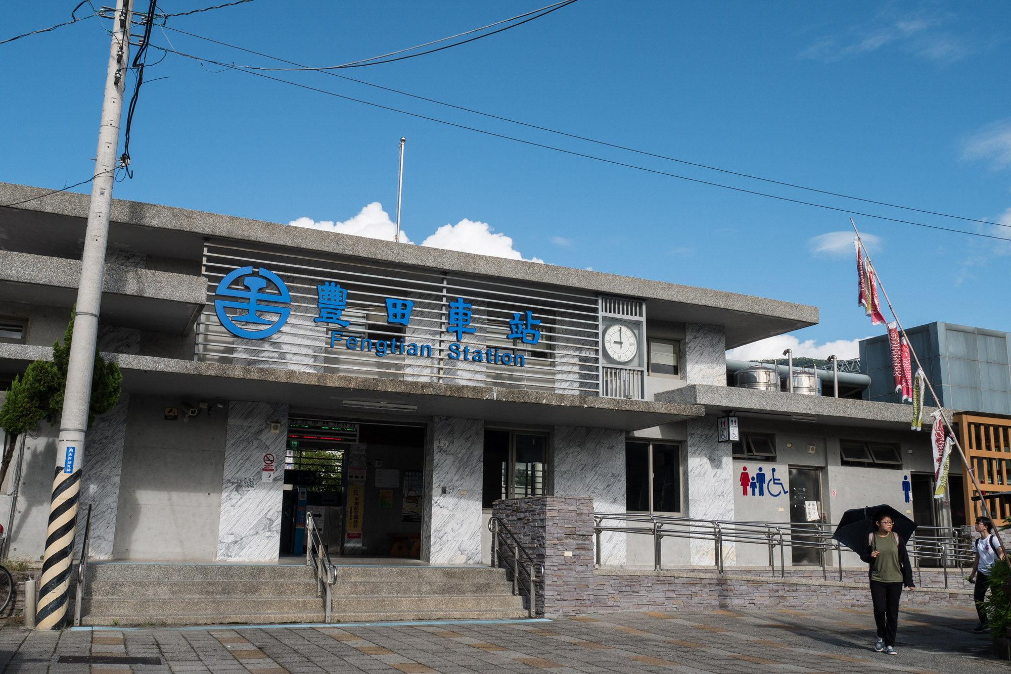 臺灣鐵路管理局豐田車站。